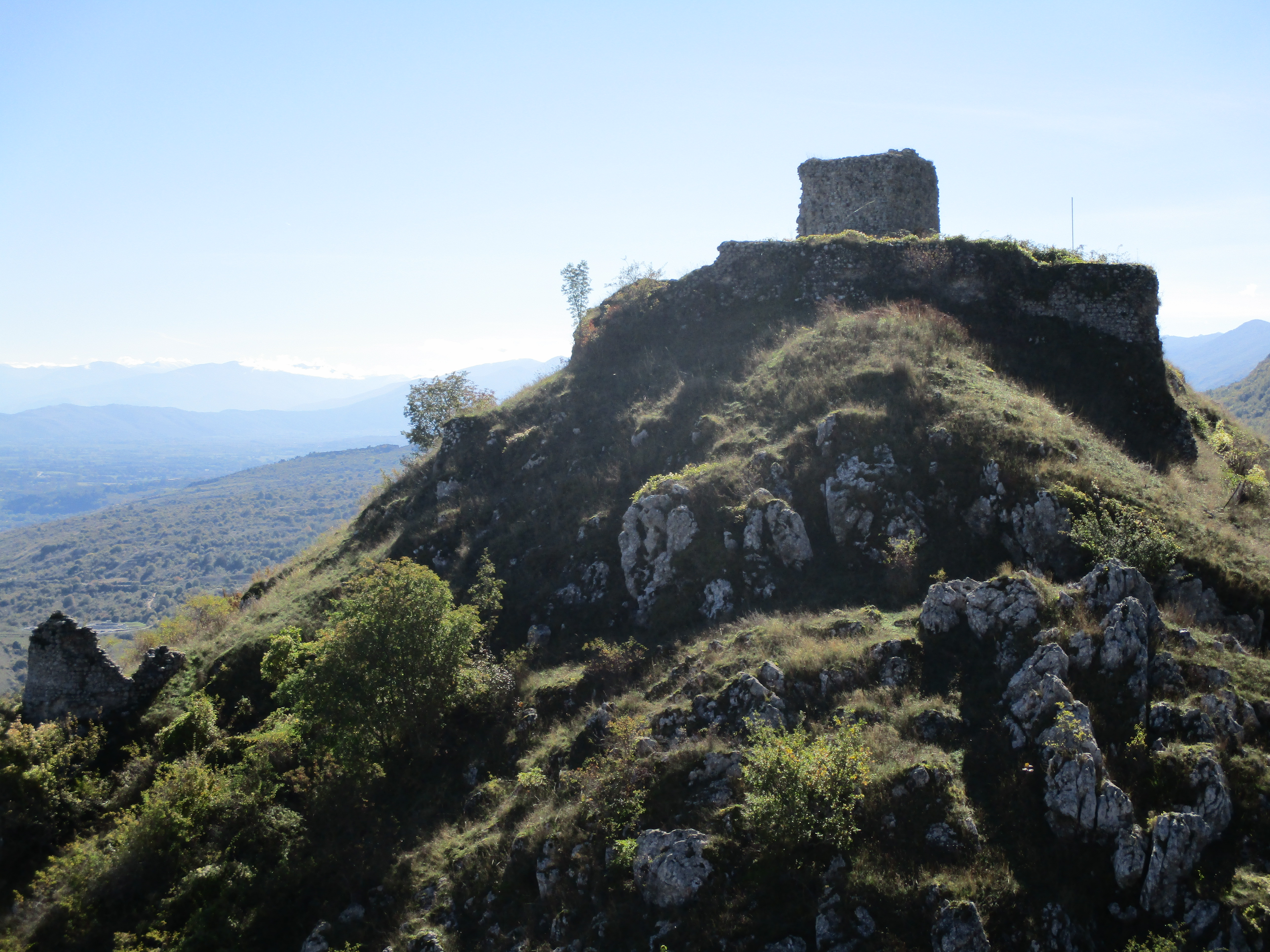 Ruderi del castello visti dal sentiero della Via Crucis